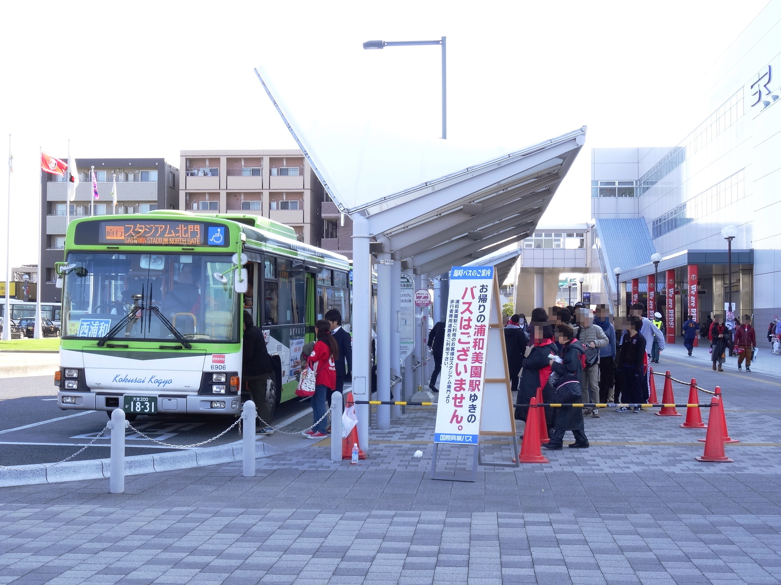 Saitama Stadium 2002 Shuttle bus